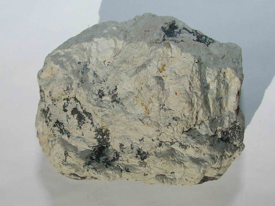 Attapulcita